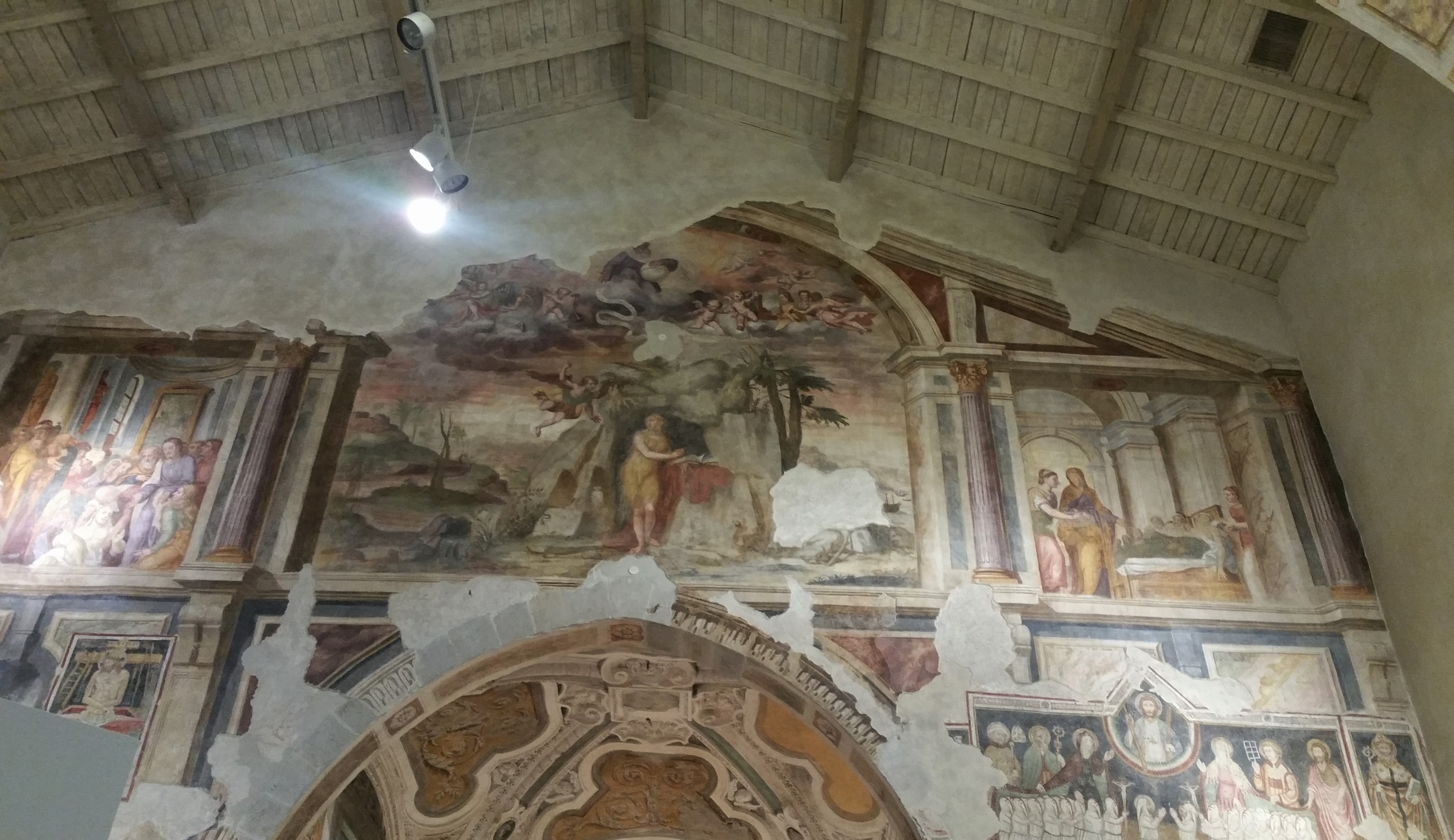 Affreschi all'interno della chiesa di Santa Maria Maddalena